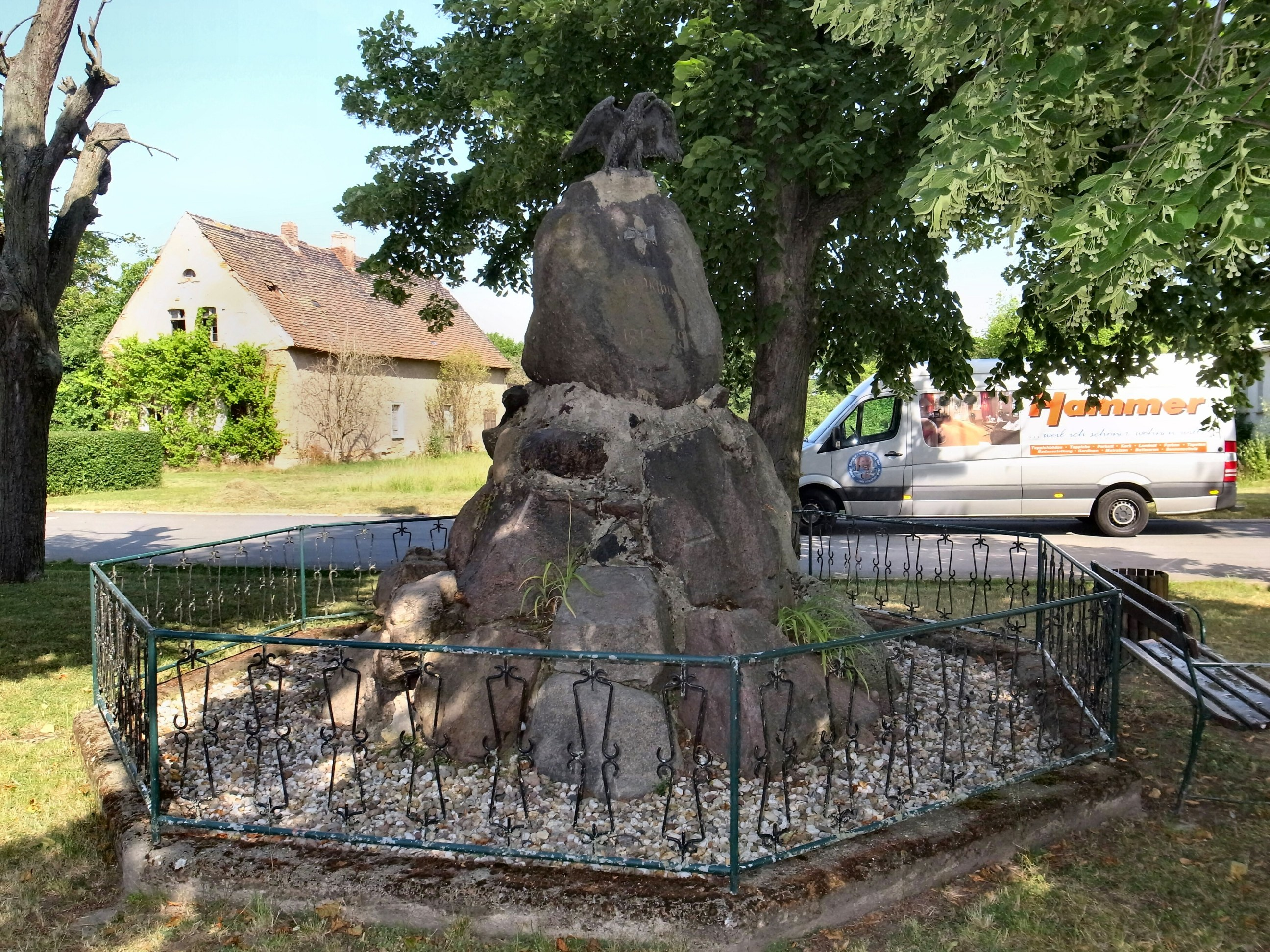 Meilendorf, Denkmal Befreiungskriege 1813